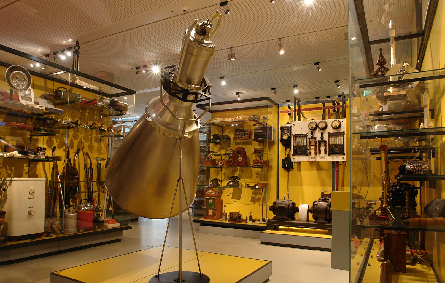 Focke-Museum Bremen: Sammlung im Schaumagazin